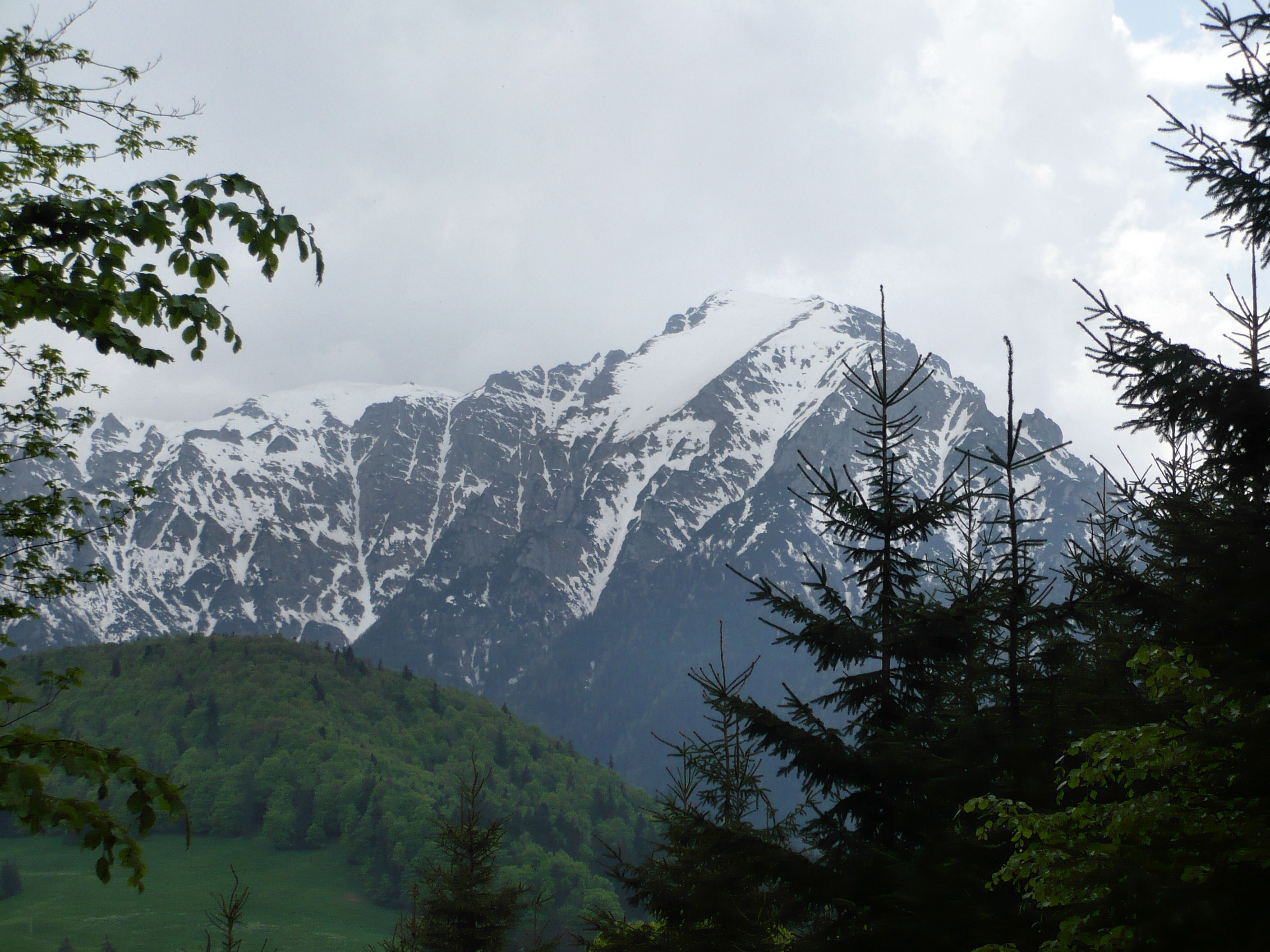 Bucegi